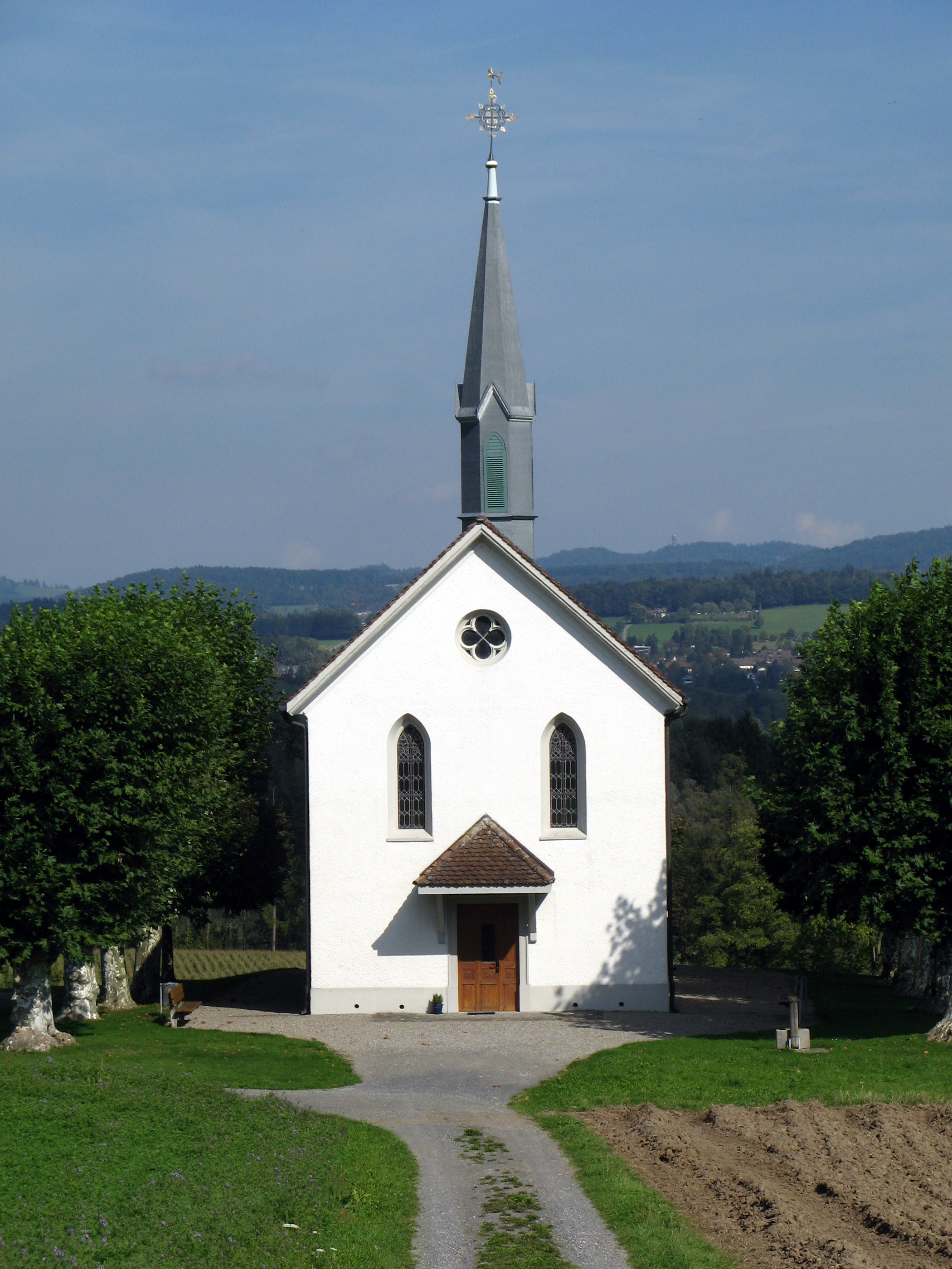 Mariahilfkapelle in Unterrüti bei Merenschwand, Aussenansicht